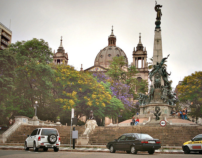 Praça da Matriz, Porto Alegre, Brasil.